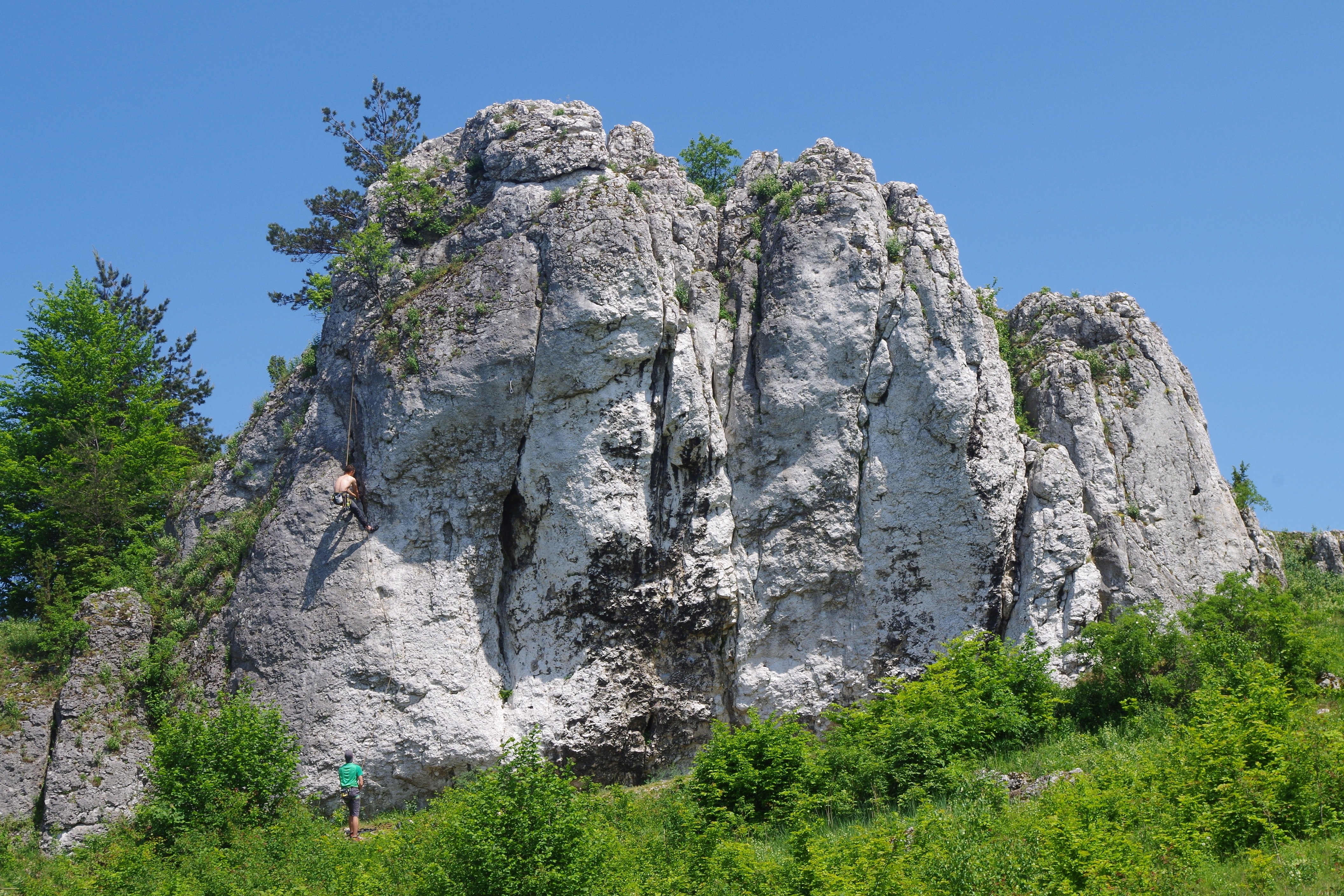 Skała Nosorożec w grupie Wielki Grochowiec w Ryczowie